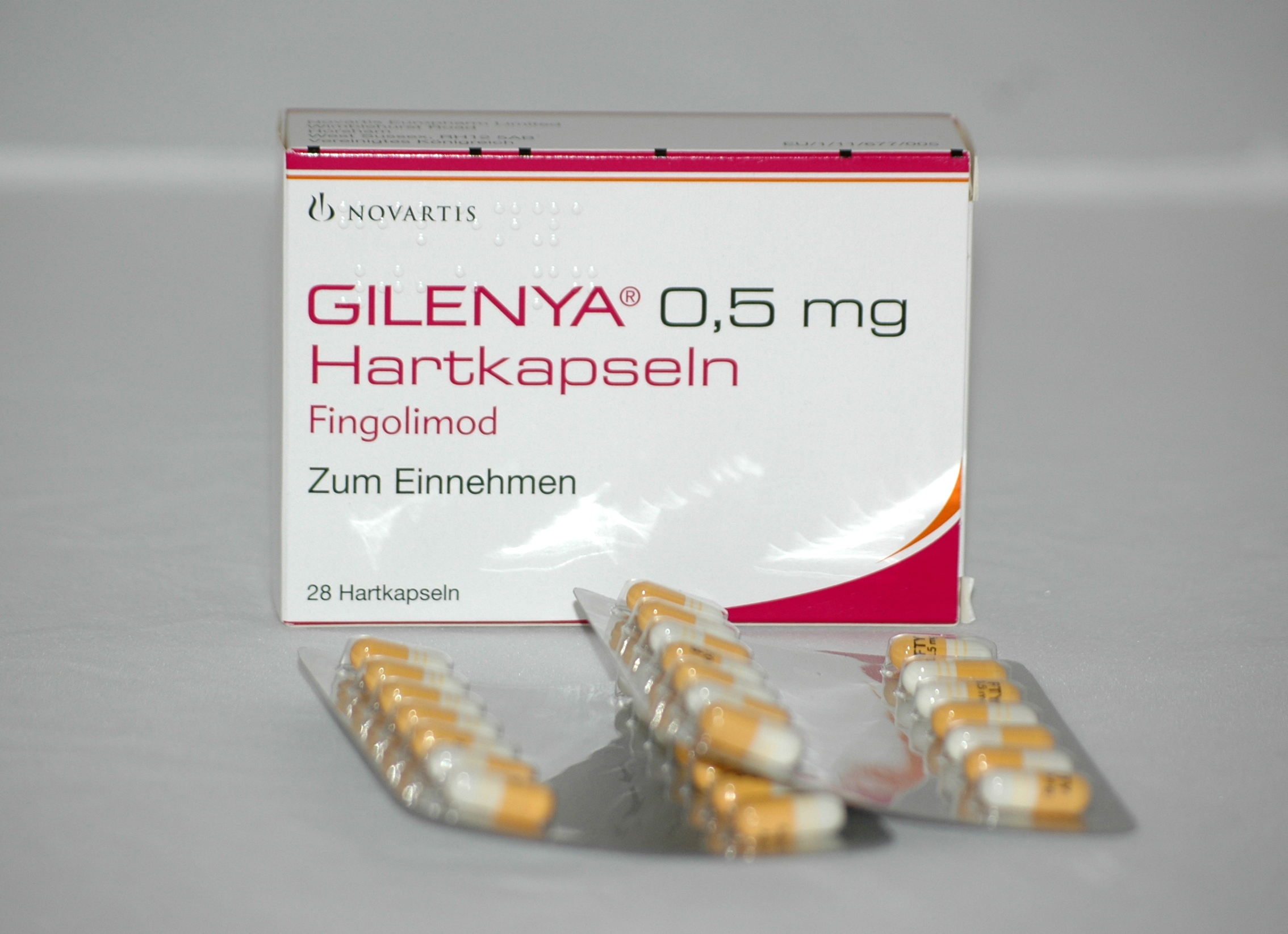 Gilenya 0,5 mg Hartkapselen Fingolimod